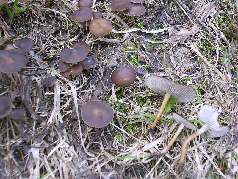 Strobilurus tenacellus original description was: Strobilurus tenacellus (Pers. ex Fr.) Singer Arlassà sota lissensa libra.